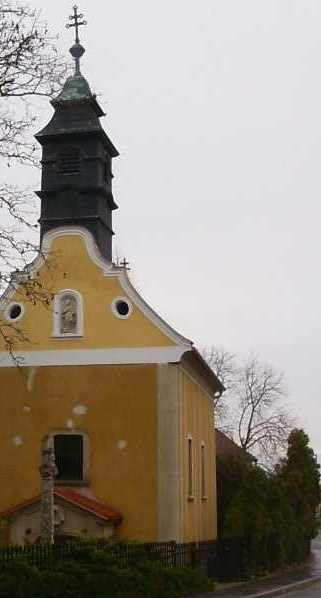 Fürdőkápolna (Balf, Sopron)